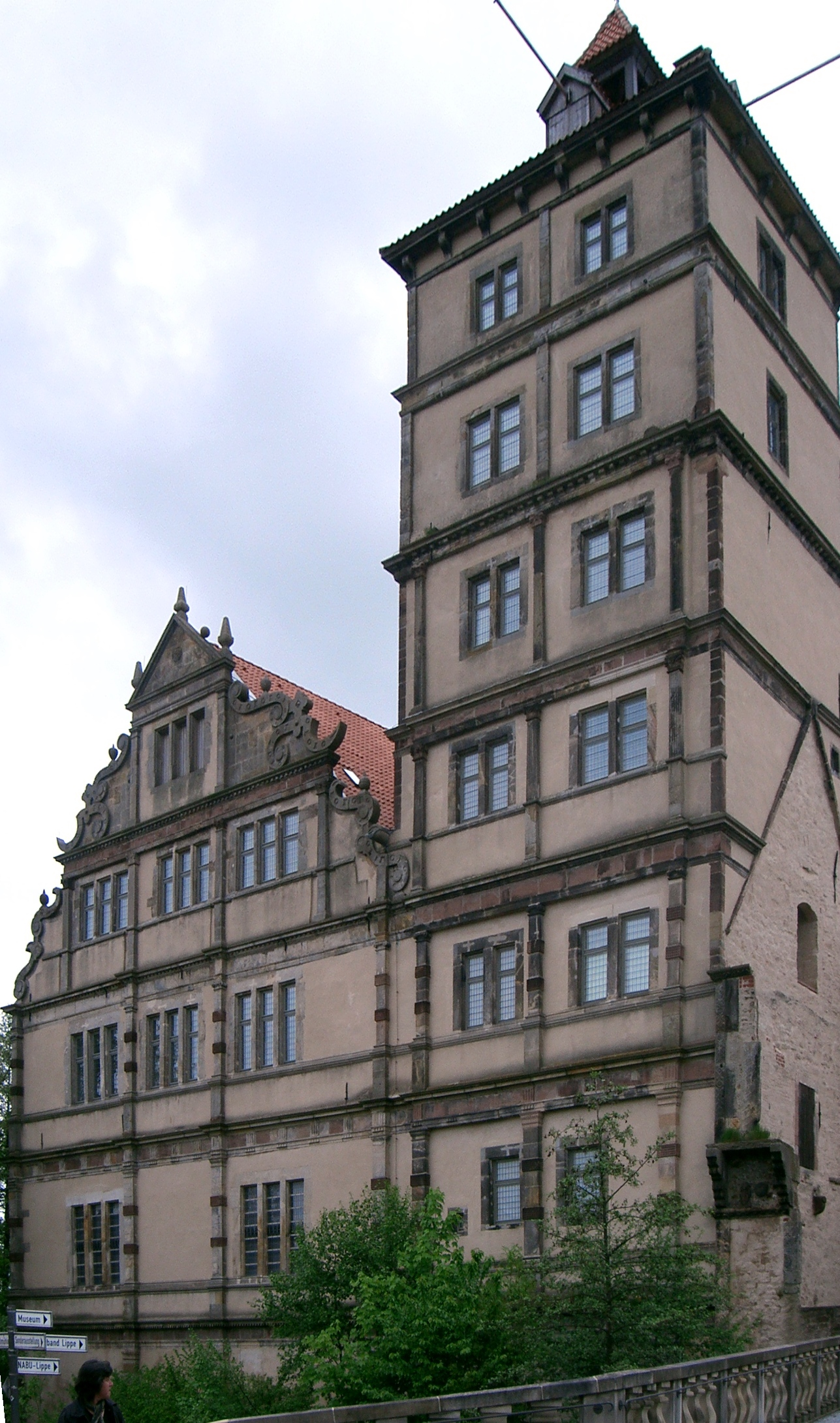 Lemgo: Schloss Brake. Zustand im Mai 2004. Eigenes Photo.